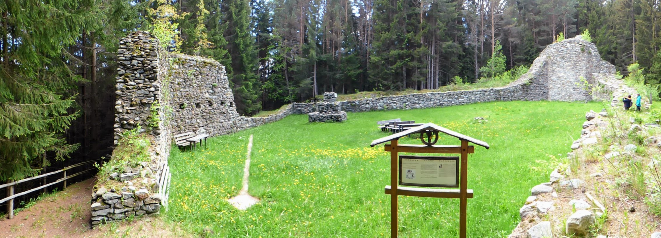 Burgruine Thurnschall, Zoitzach, Gemeinde Lessach (Salzburg)